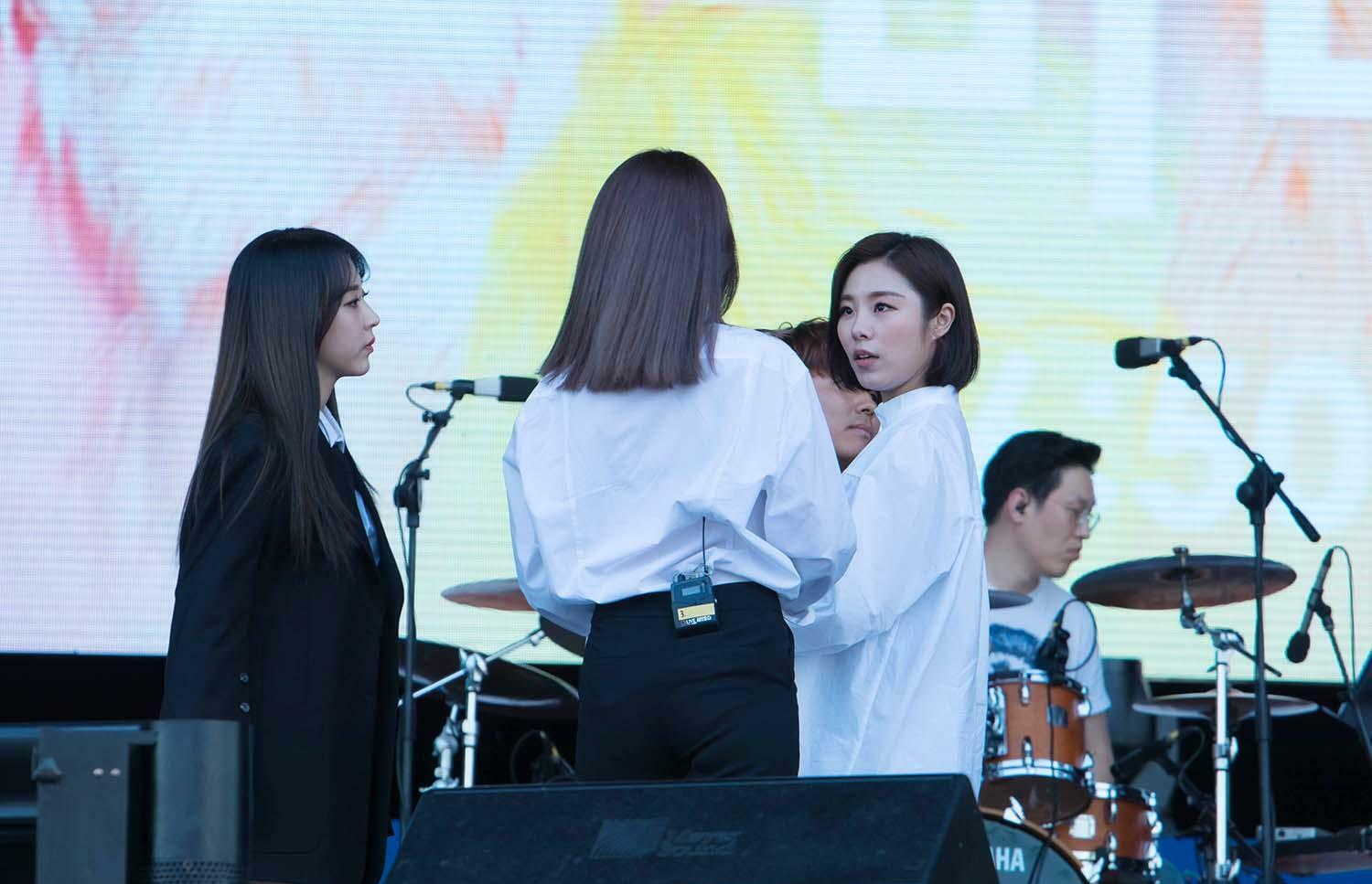 17.09.23 조이올팍페스티벌 - 마마무(MAMAMOO)